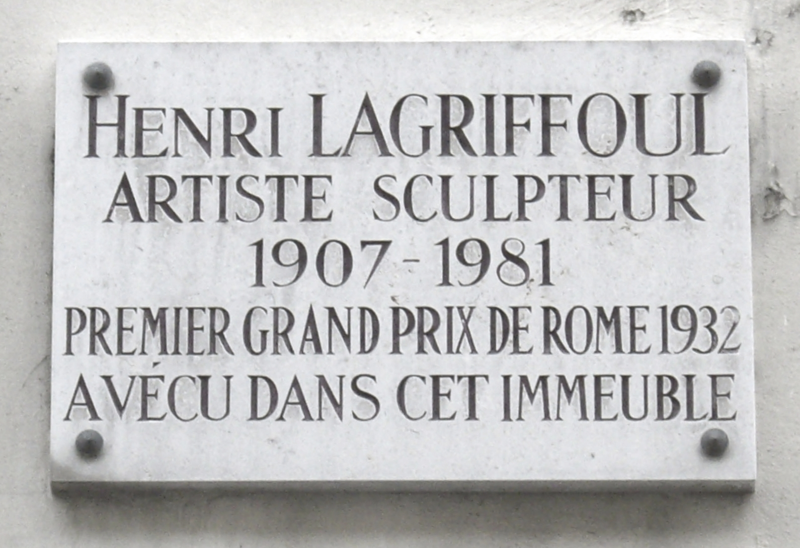 Plaque commémorative, 5 rue Mazarine, Paris 6e. « Henri Lagriffoul, artiste sculpteur, 1907-1981, premier grand prix de Rome 1932, a vécu dans cet immeuble. »